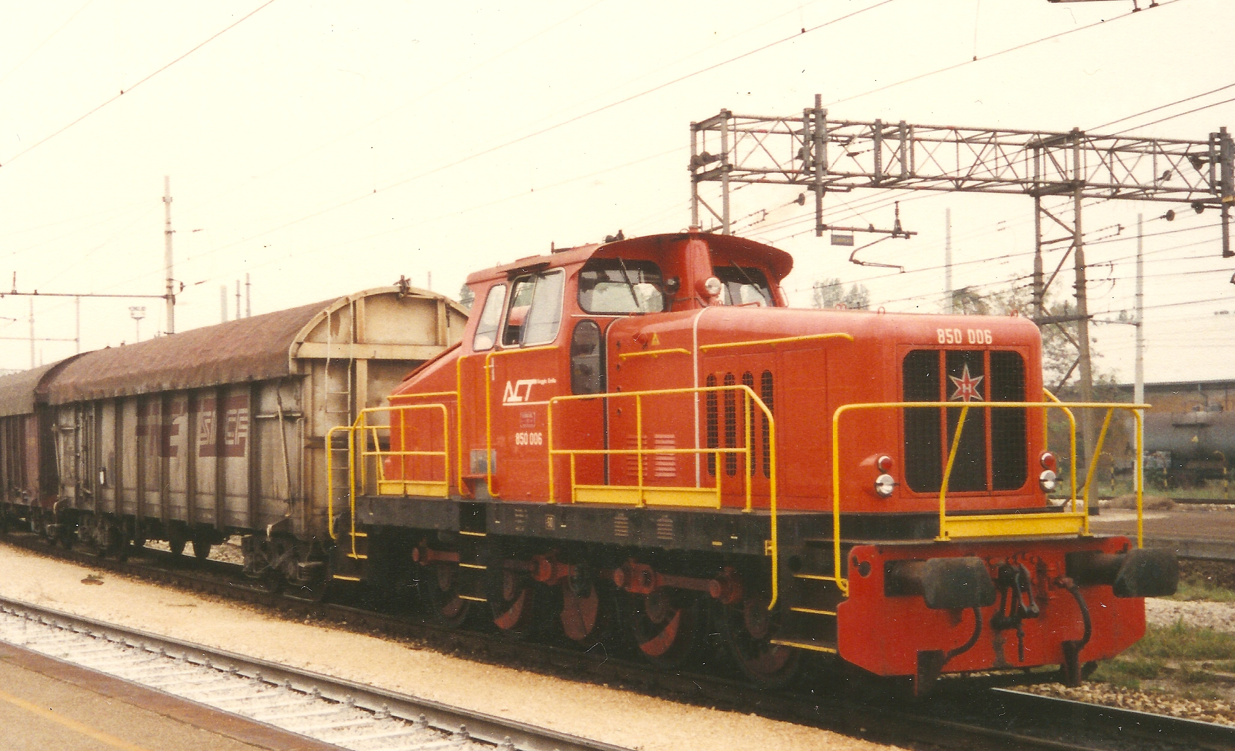 Locomotiva 850.006 dell'ACT in sosta a Reggio Emilia